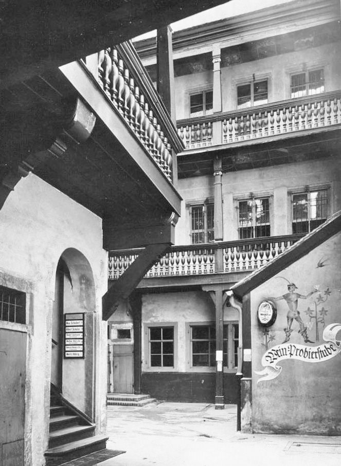 Der Alte Hof in Leipzig (Katharinenstraße 27), Hofbereich